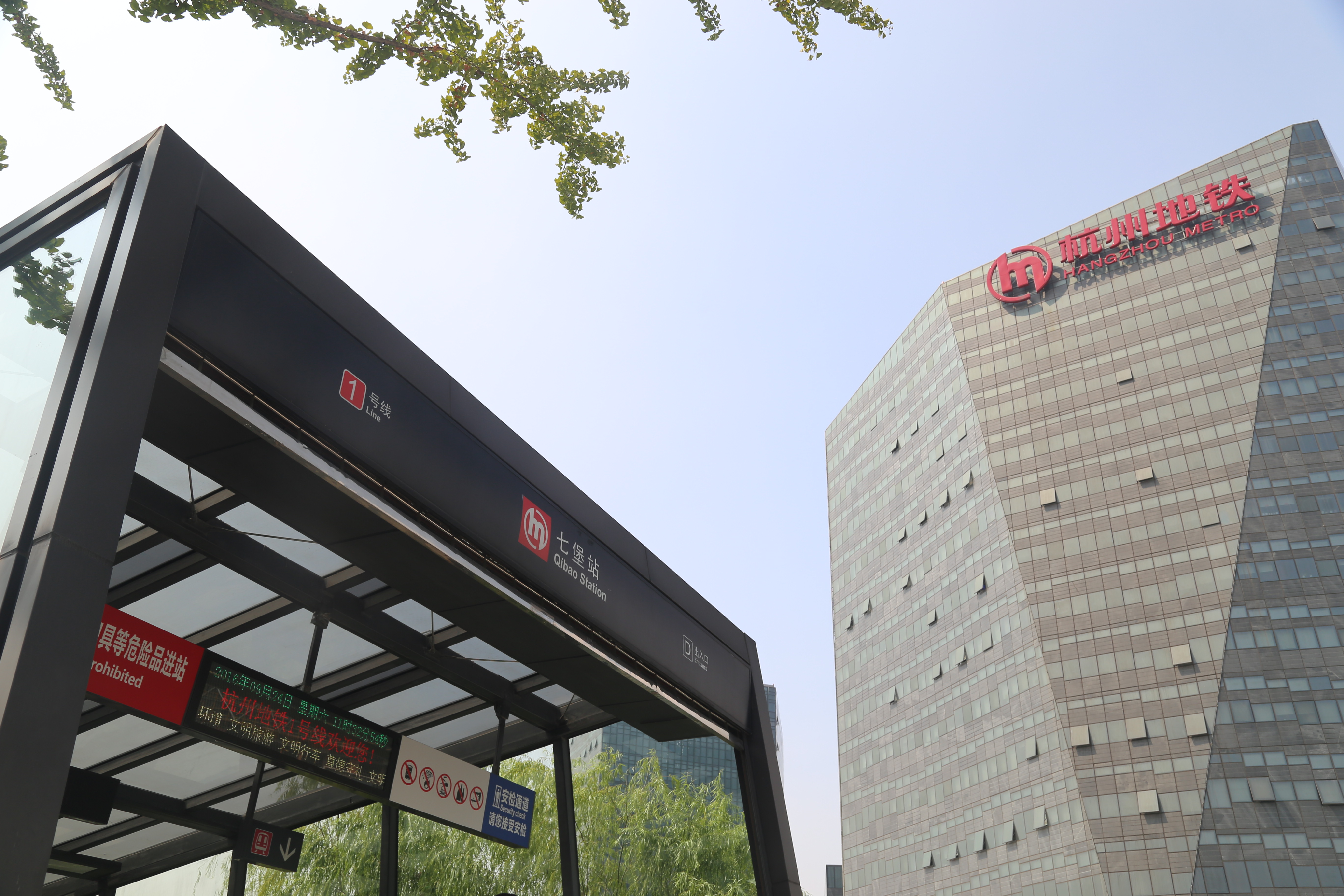 杭州地铁七堡站D入口